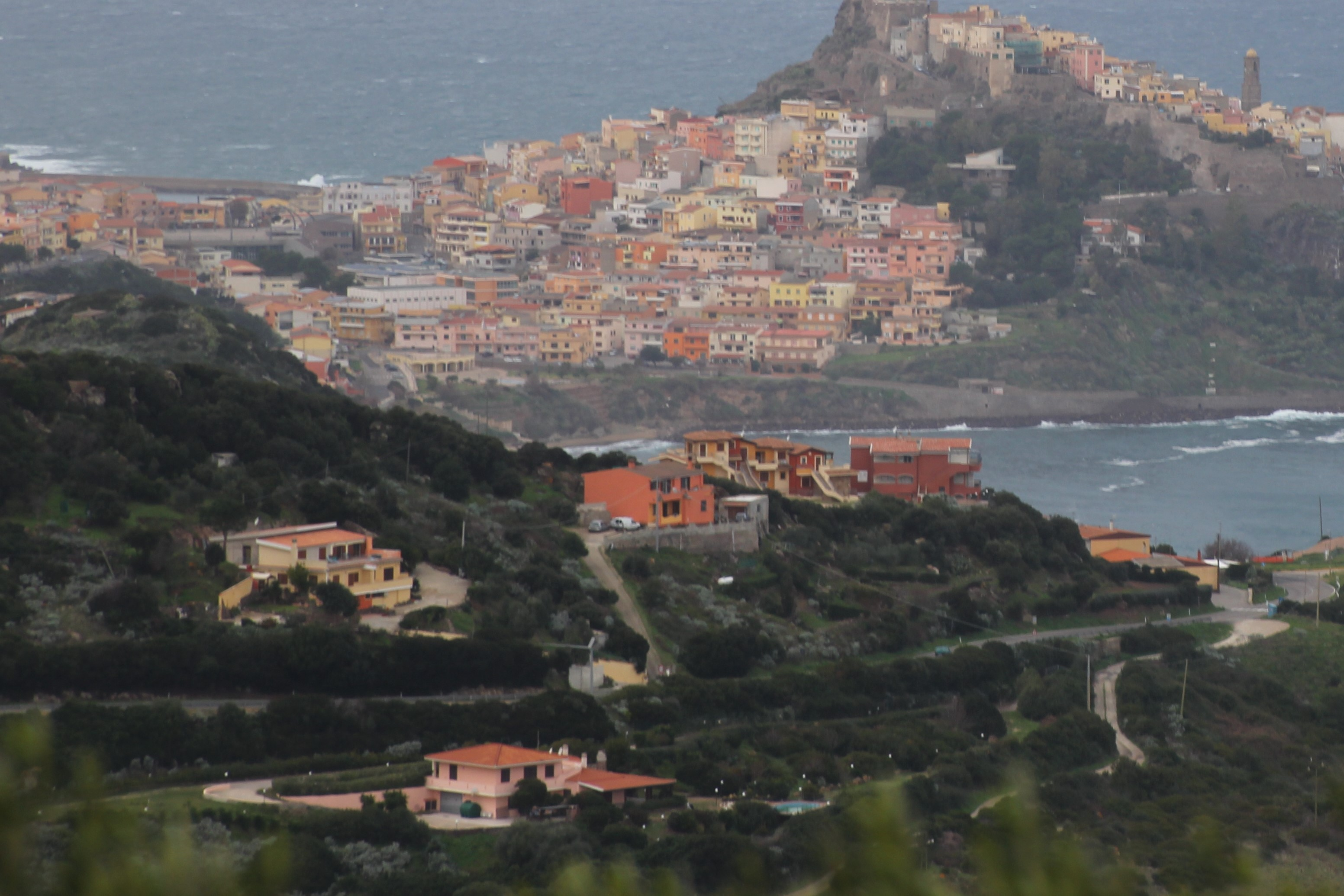 Castelsardo, frazione Terrabianca